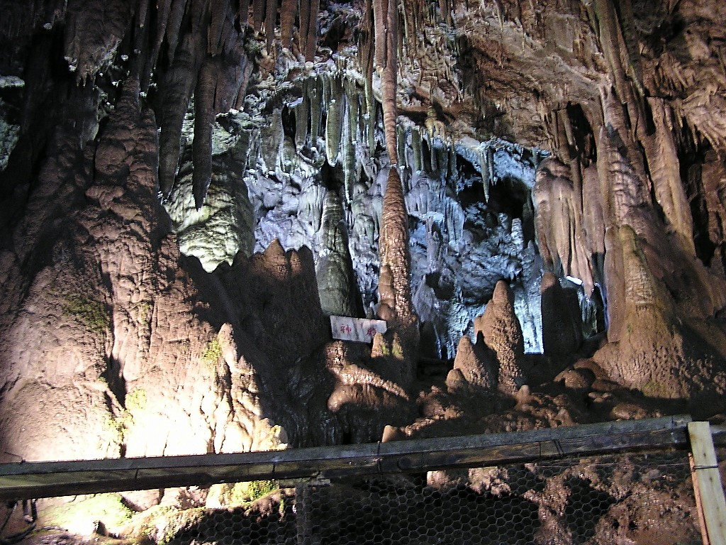 安家洞内部「神殿」